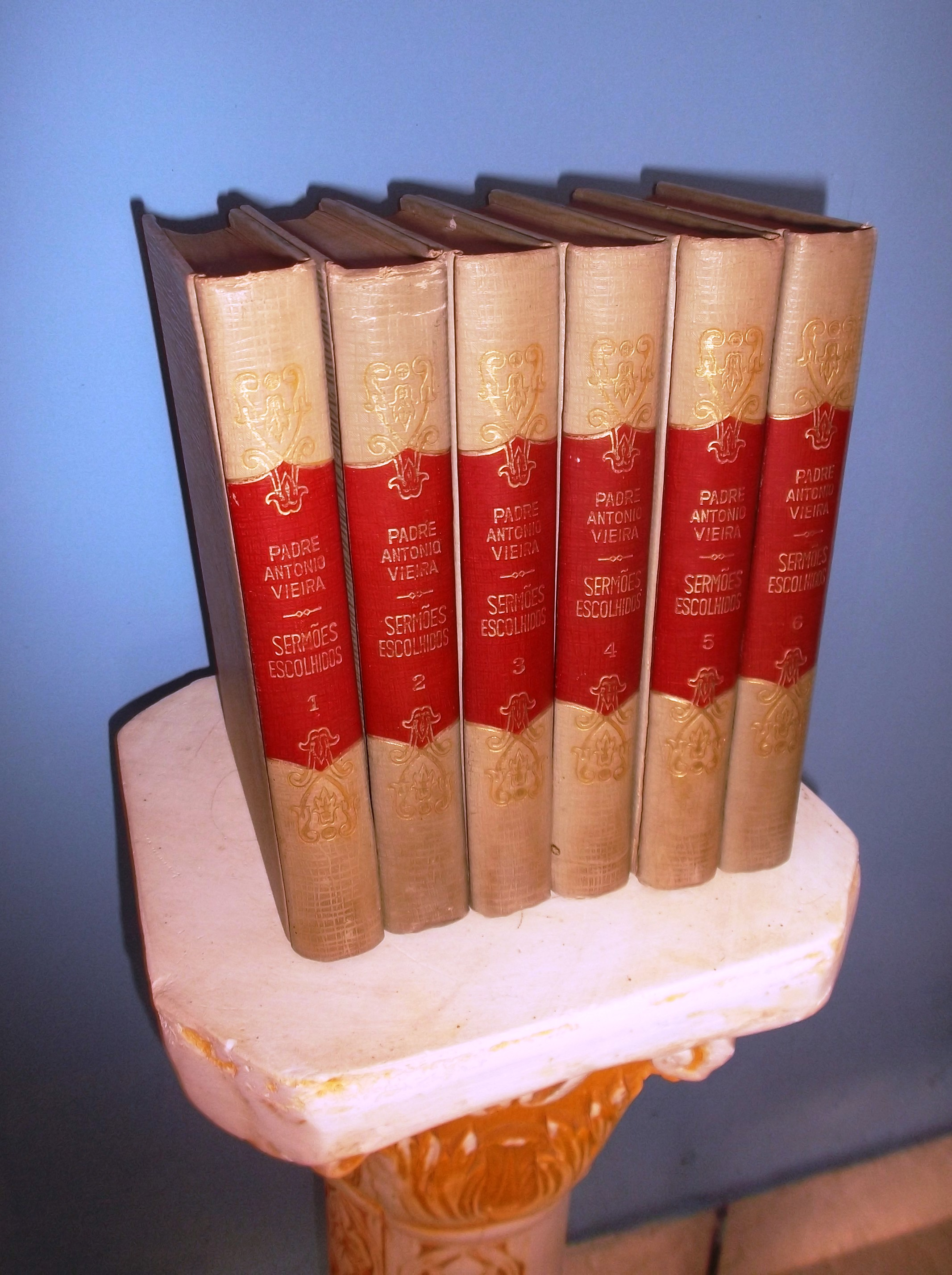 Seis volumes dos sermões de Antônio Vieira em uma Biblioteca Pública no Brasil.